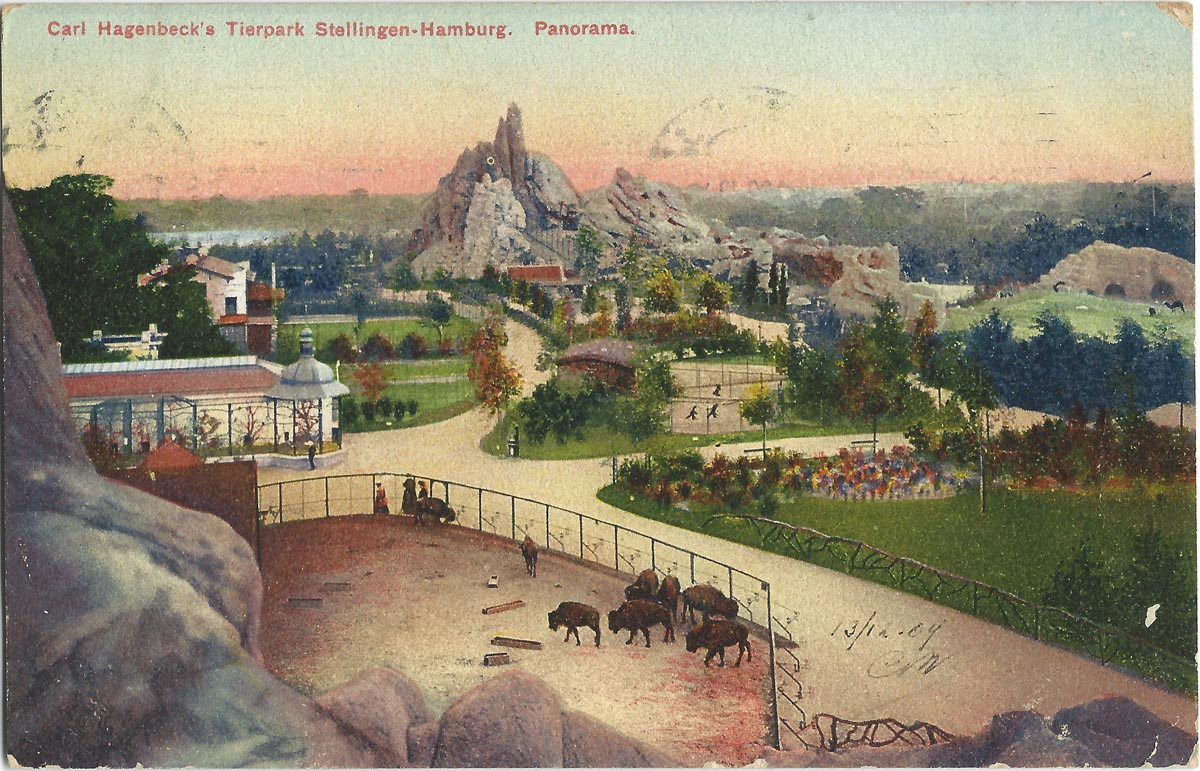 Vue de Hambourg au début du XXe siècle (carte postale).